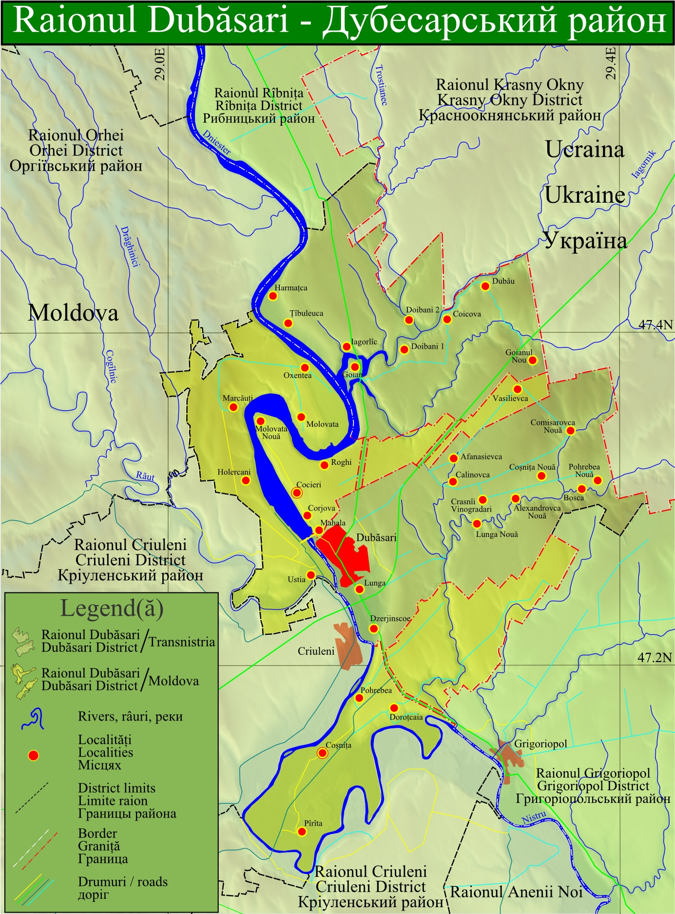 Raionul Dubasari, harta de detaliu.